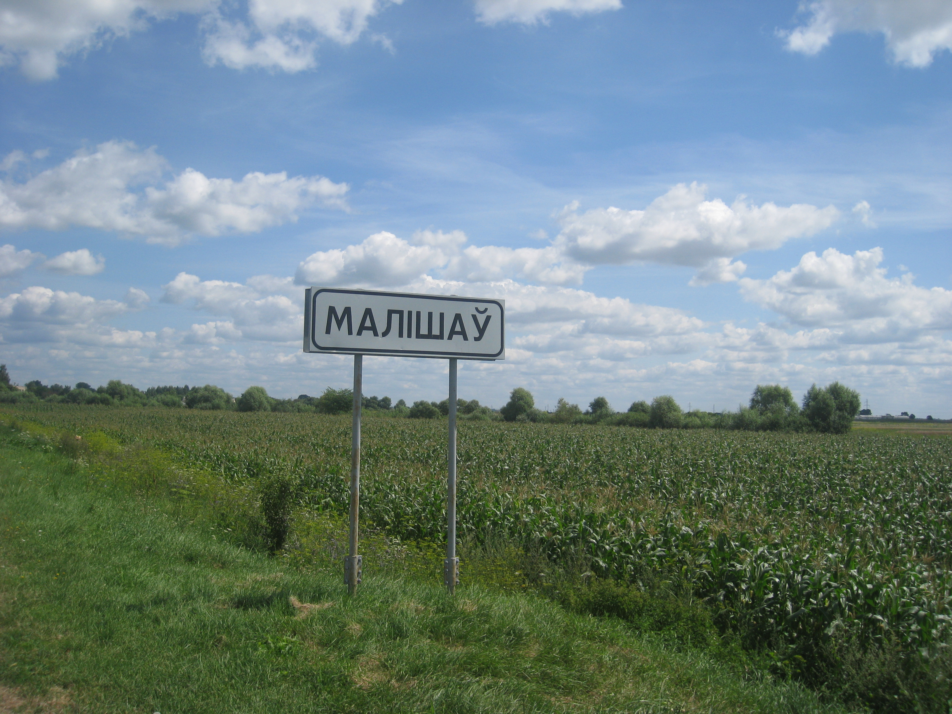 Малешаў. Дарожны знак на шашы Р88 пры ўезьдзе з боку Давыд-Гарадка.